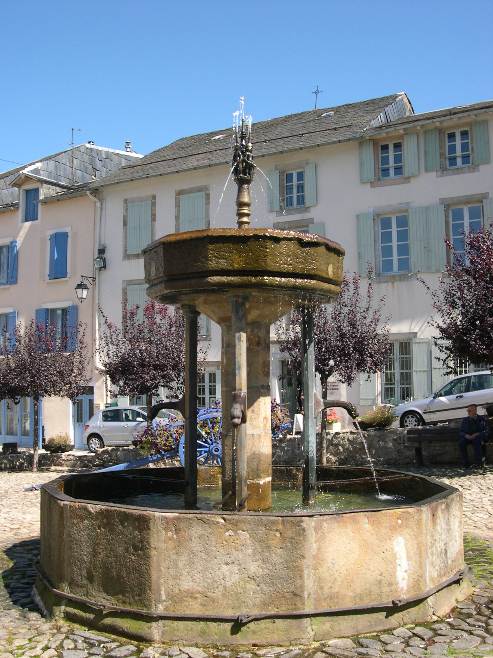 Lacaune (Tarn) - Fontaine des Pisseurs (XVIe siècle).